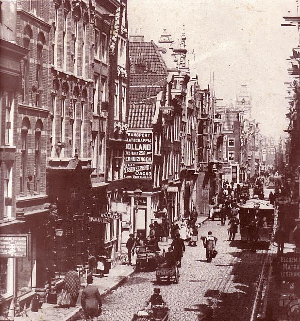 Vijzelstreet towards MuntpleinAmsterdam 1891